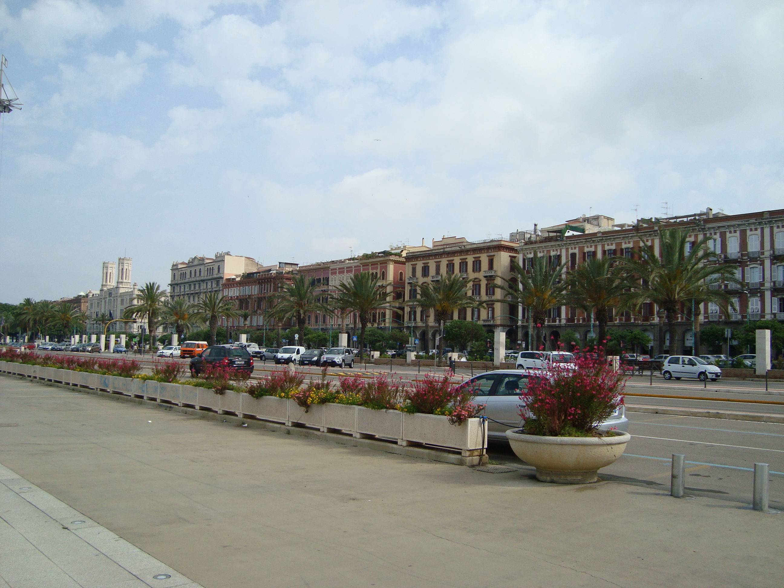 Cagliari